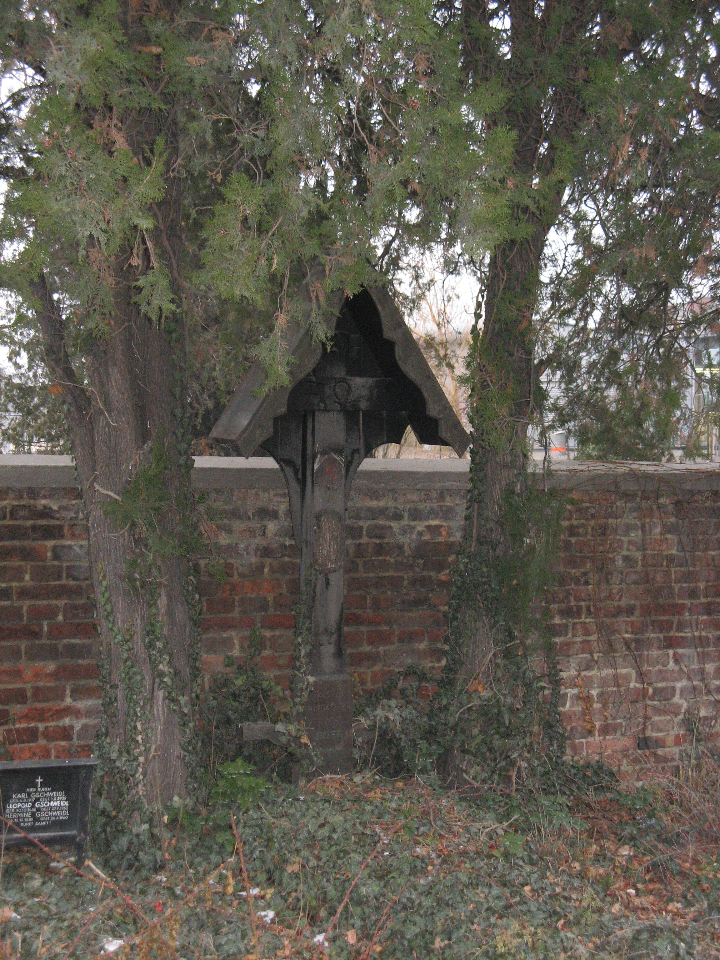 Altmannsdorfer Friedhof in Wien-Meidling